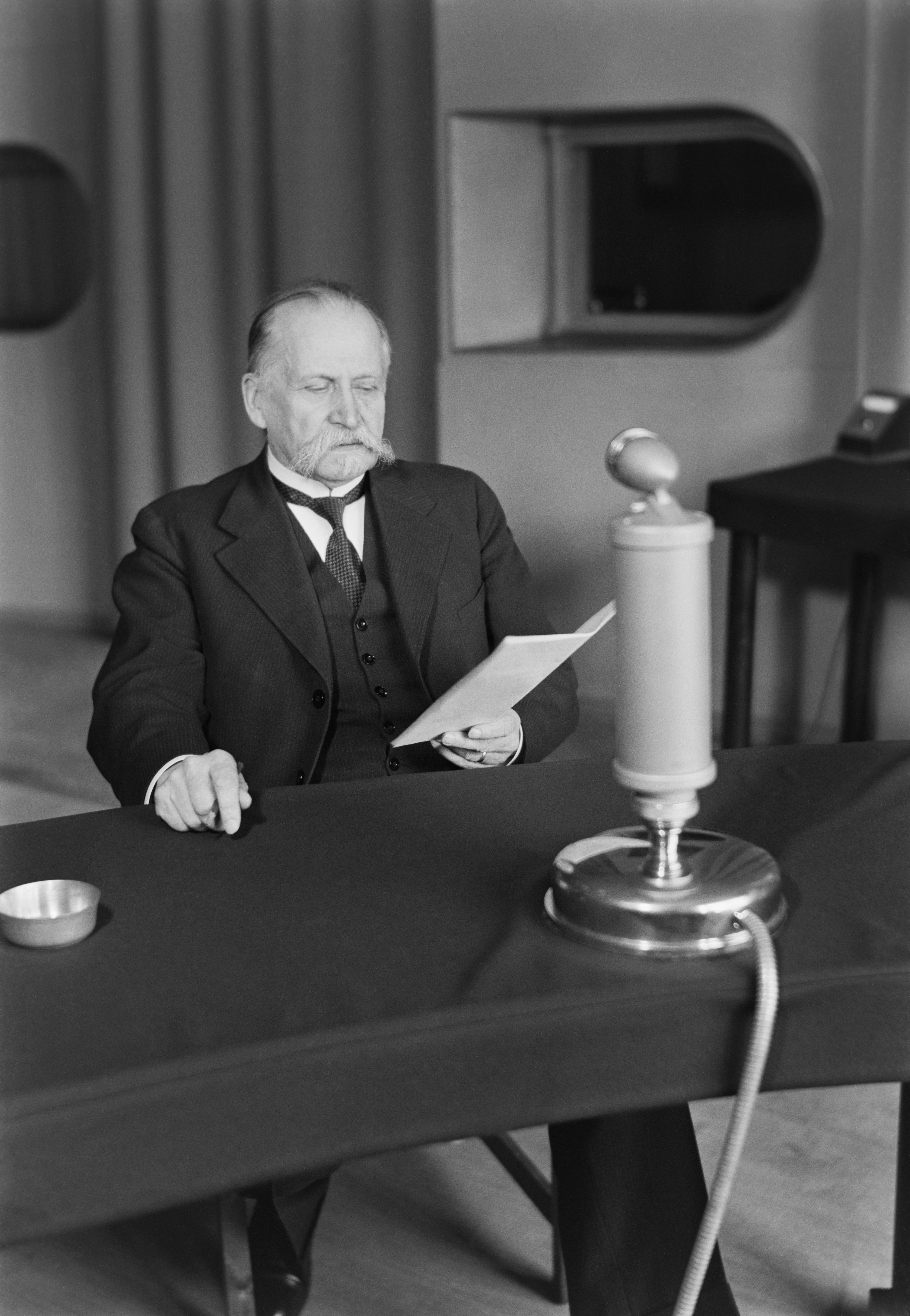 Presidentti Kyösti Kallio pitämässä radiopuhetta studiossa, mikrofoni pöydällä. Kuvausaika arvioitu vuosikymmenen tarkkuudella. Tiedätkö jotain tästä kuvasta? Jätä kommentti tai ota yhteyttä sähköpostitse: Tutustu Ylen arkistosisältöihin: Fler skatter från Yles arkiv: More about Yle, the Finnish Broadcasting Company